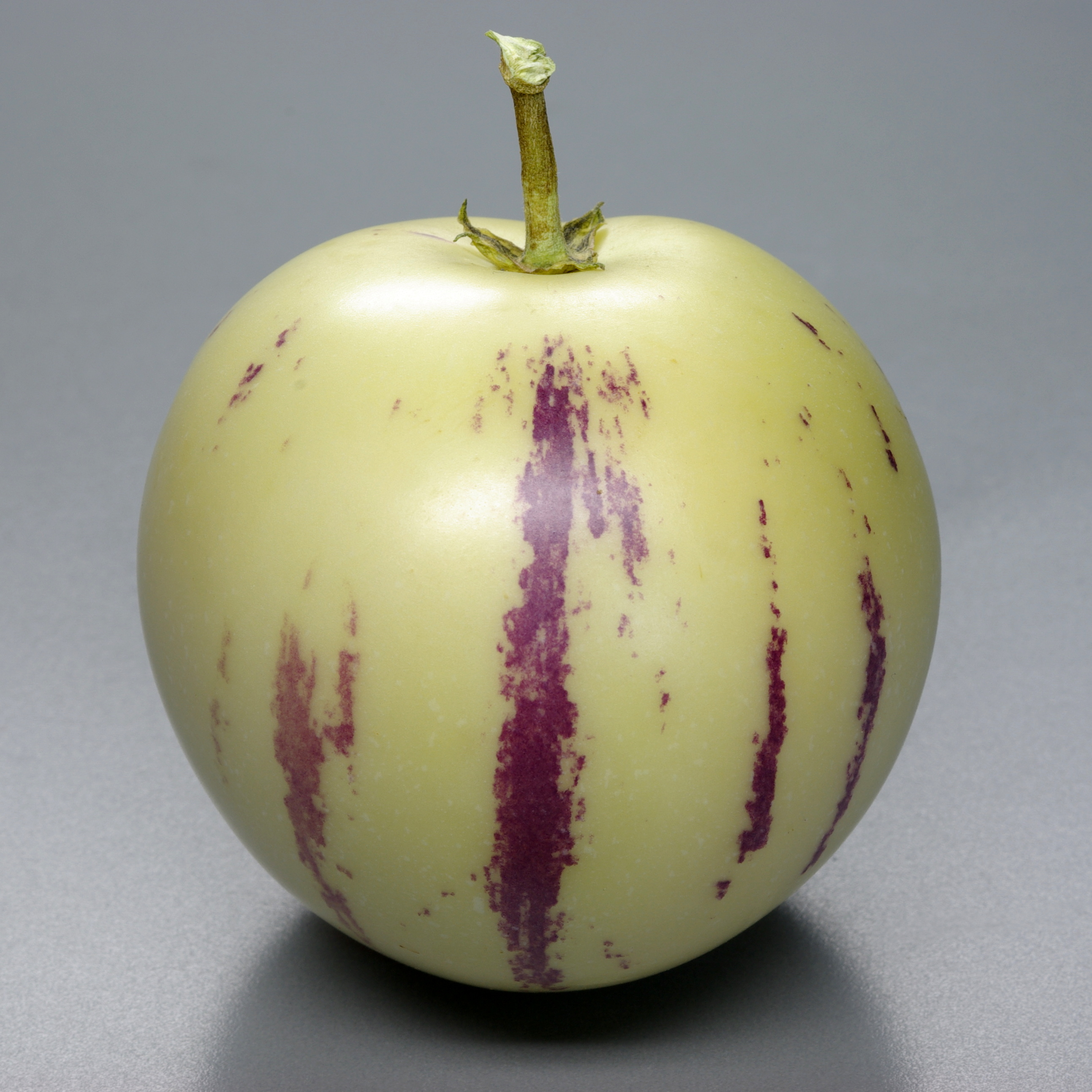 Solanum muricatum, ca. 8 cm, ca. 600 g